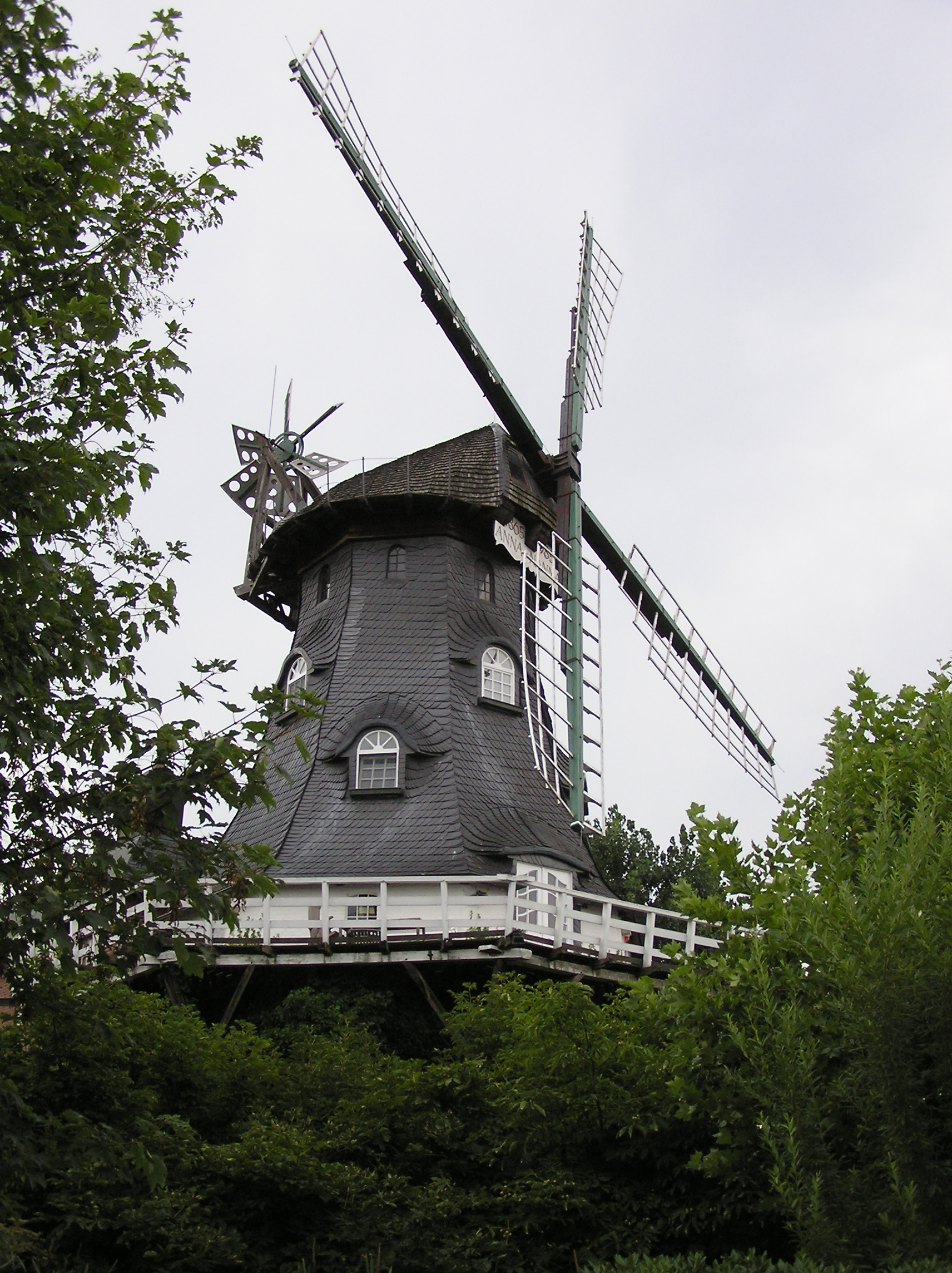 Windmill Garlstorf,NS,Germany